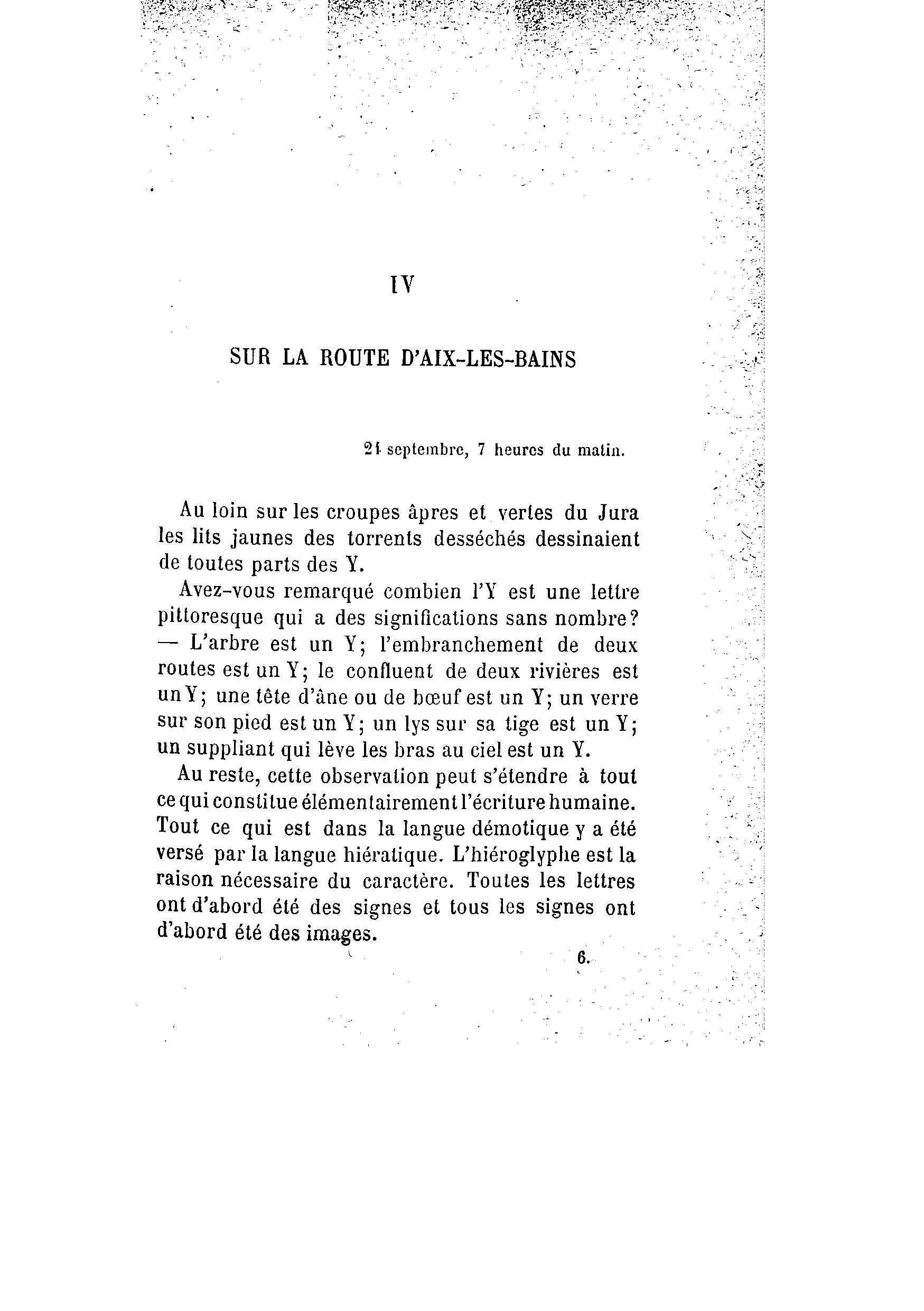 Passage de En Voyage